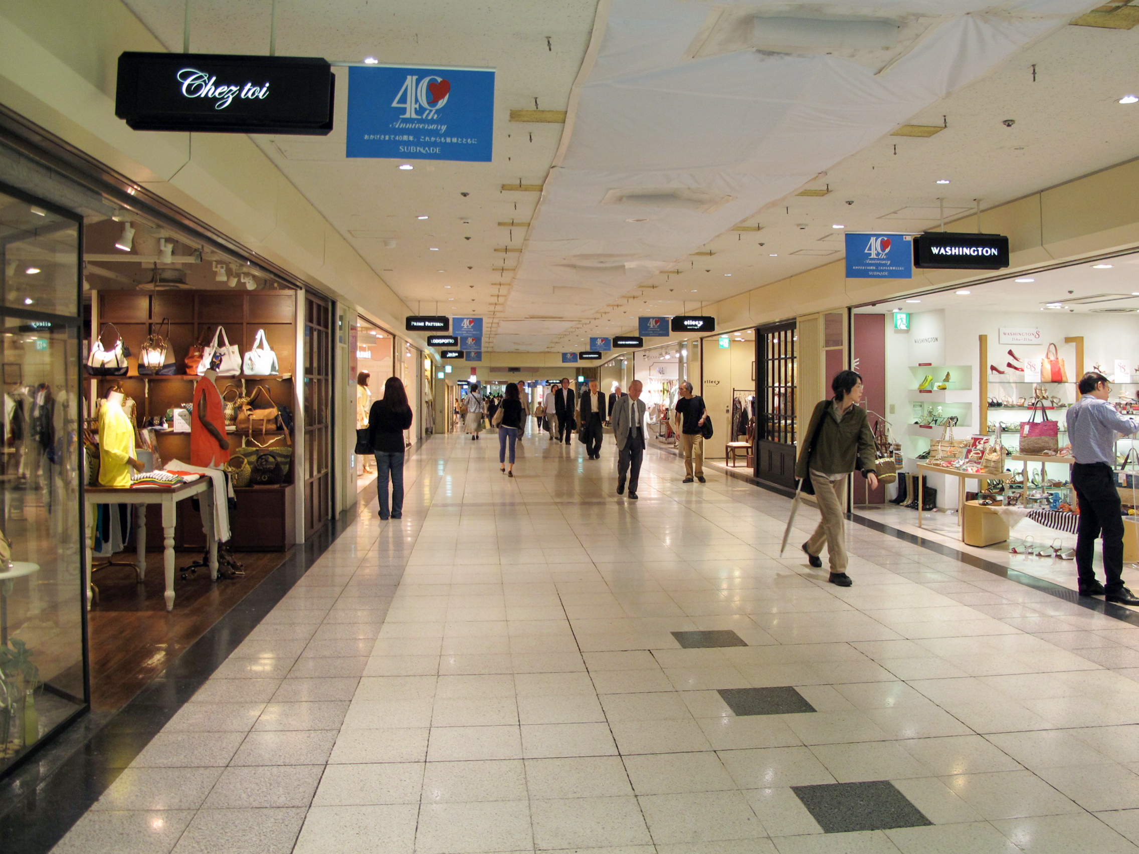 SHINJUKU SUBNADE